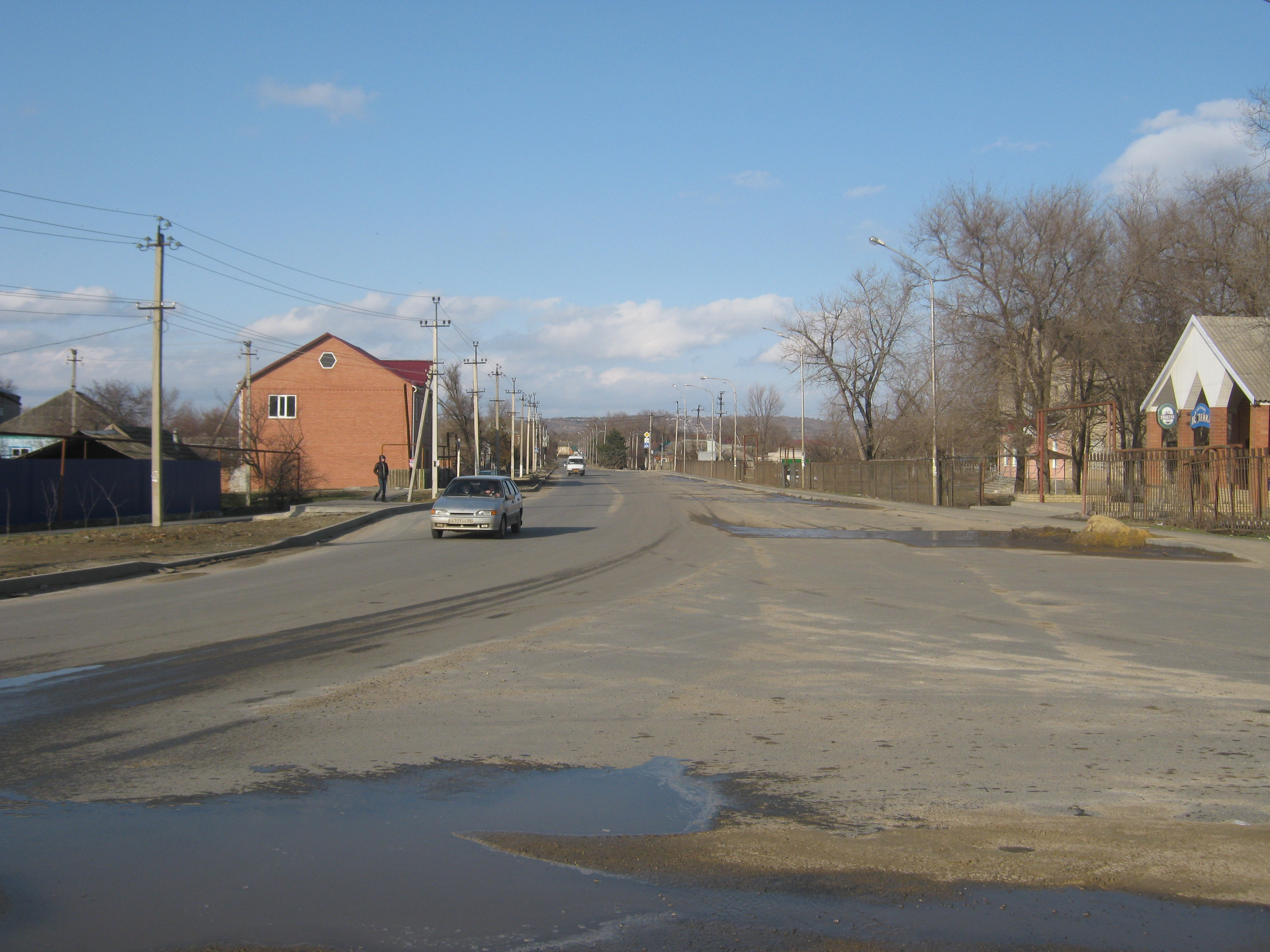 Улица Калинина в Светлограде,фотография от перекрёстка с улицей Малыгина в сторону центра